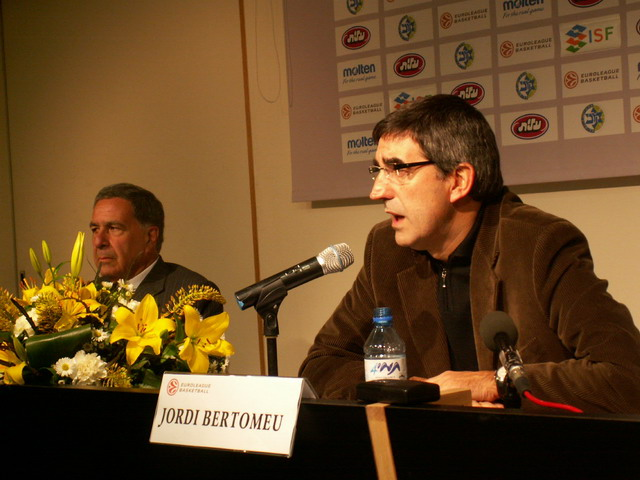 שמעון מזרחי, יו"ר מכבי תל-אביב צולם על-ידי אבי קדמי This picture was taken by Avi Kedmi